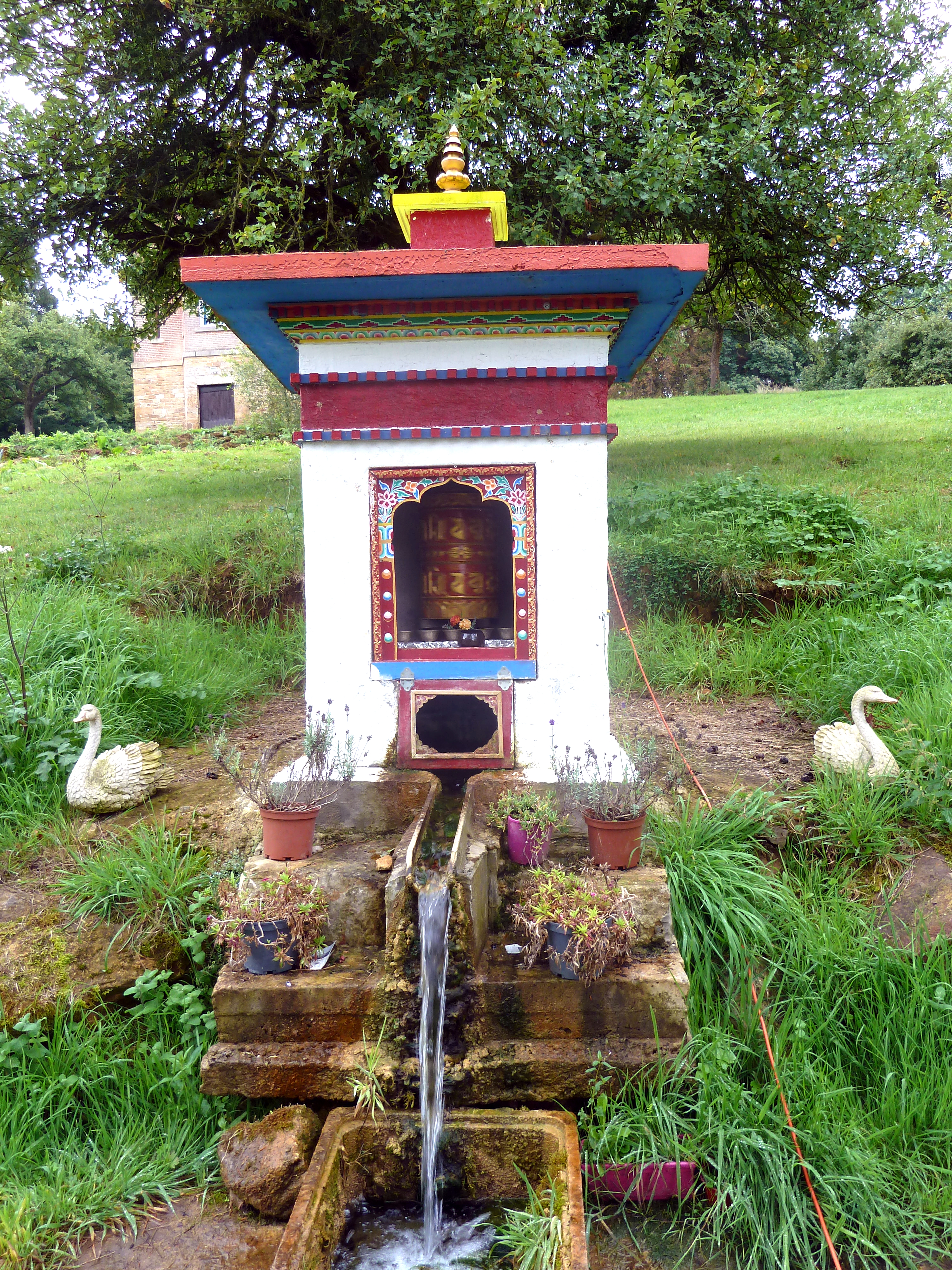 Vajradhara-Ling P1060707 - le petit moulin à prières au bord de l'eau